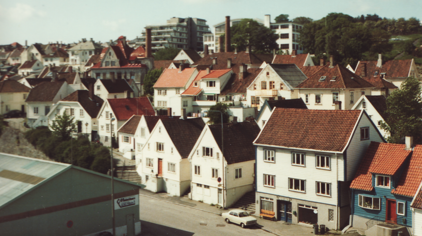 Trehus i Stavanger, Maisons en bois à Stavanger.